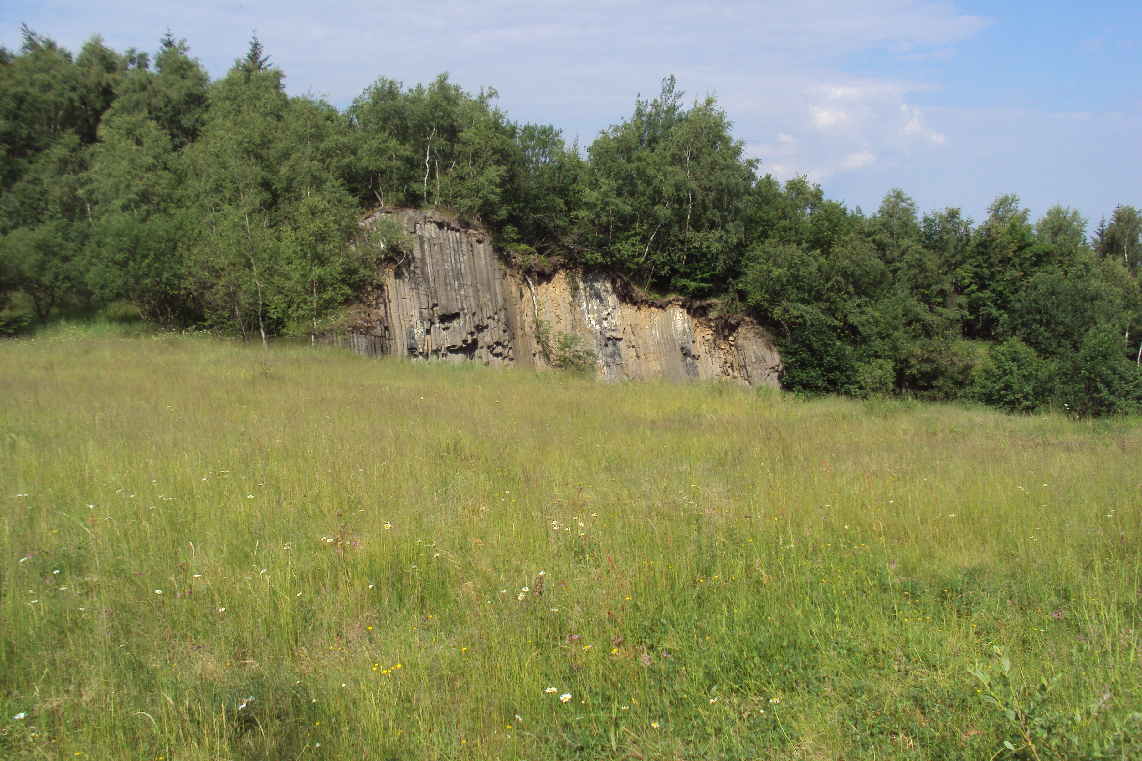 Lom u kopce Klučky je opuštěn při silnici od Nového Boru do Polevska, asi katastr Horního Prysku